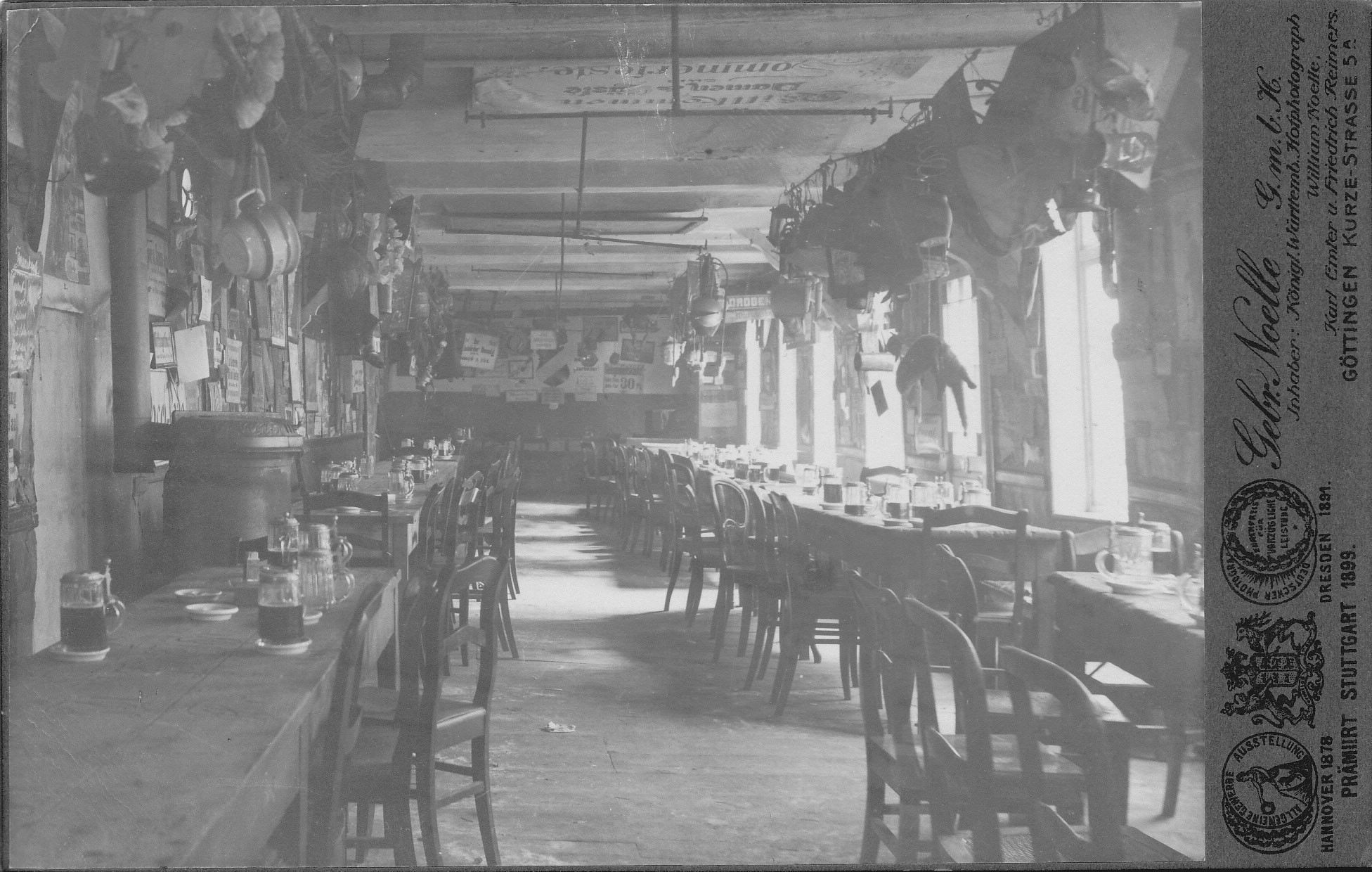 Fotografie der "Alte Fink", des Kneiplokals des Göttinger Senioren-Convents